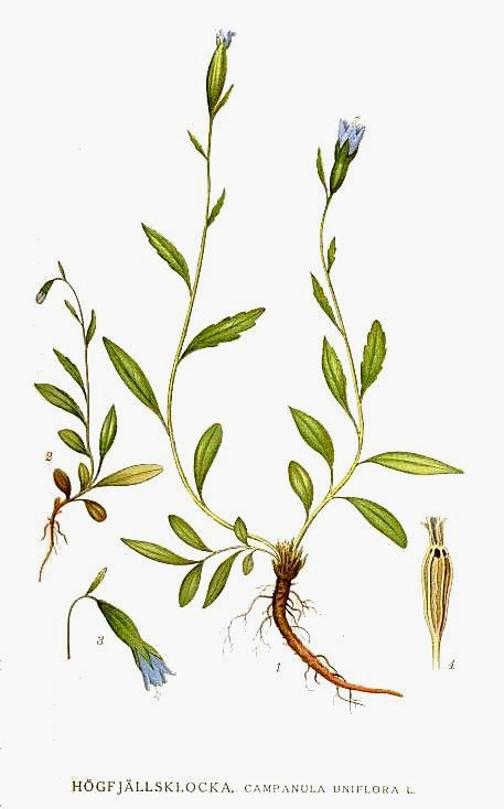 Original Description Högfjällklocka, Campanula uniflora L.